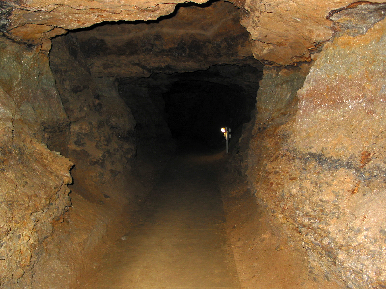 12m tiefer Stollen in der Parkhöhle Weimar